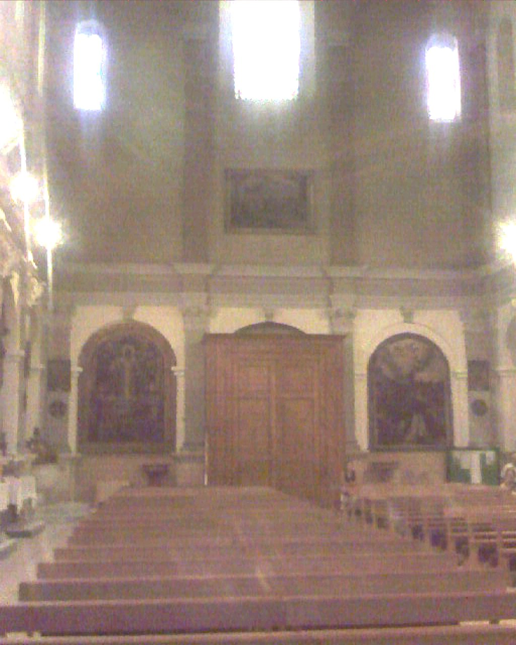 Chiesa Maria Santissima Annunziata - Modugno (Bari) - Italy